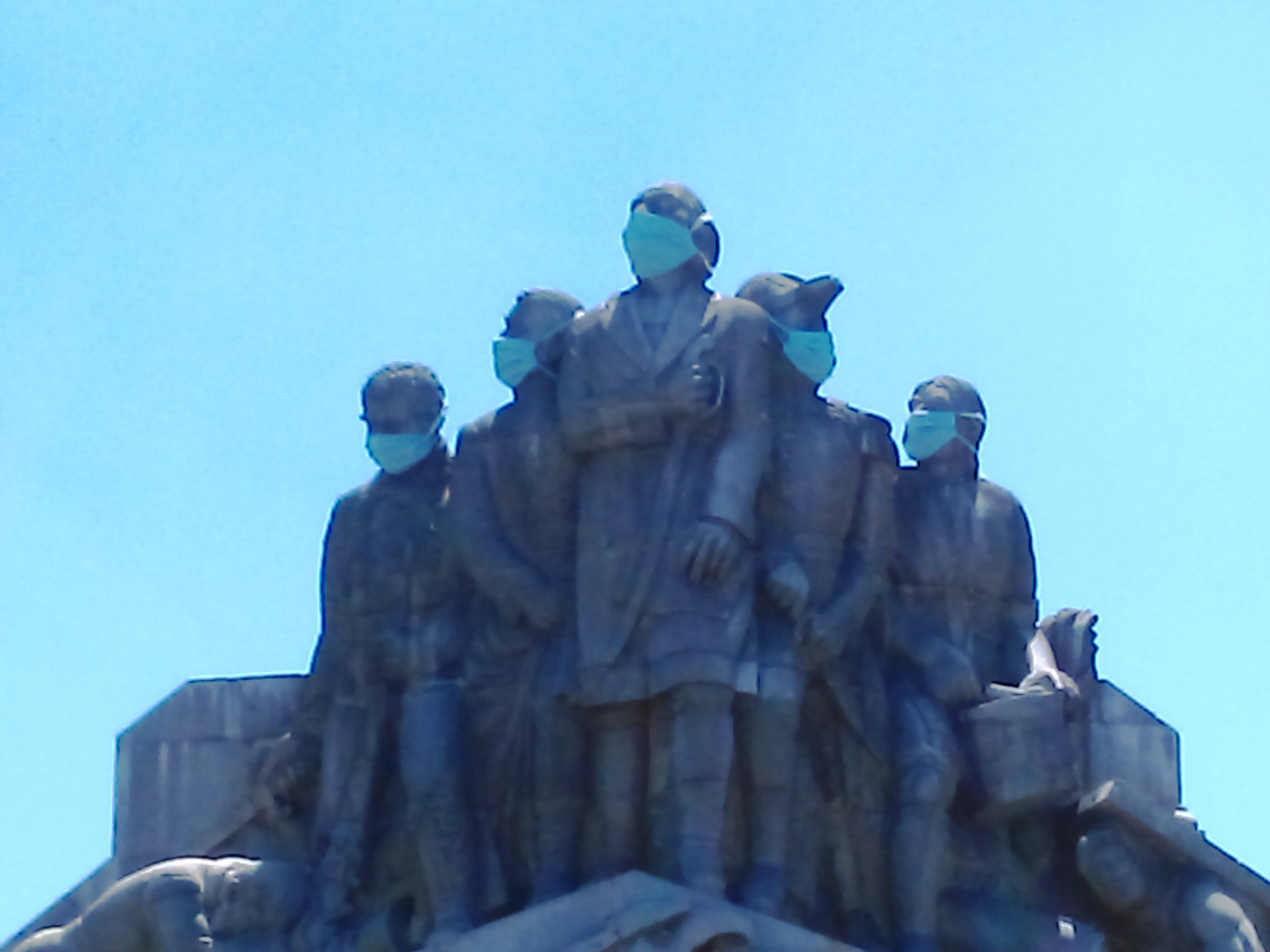 Estatuas del Monumento a los Insurgentes en Pachuca, con cubrebocas.